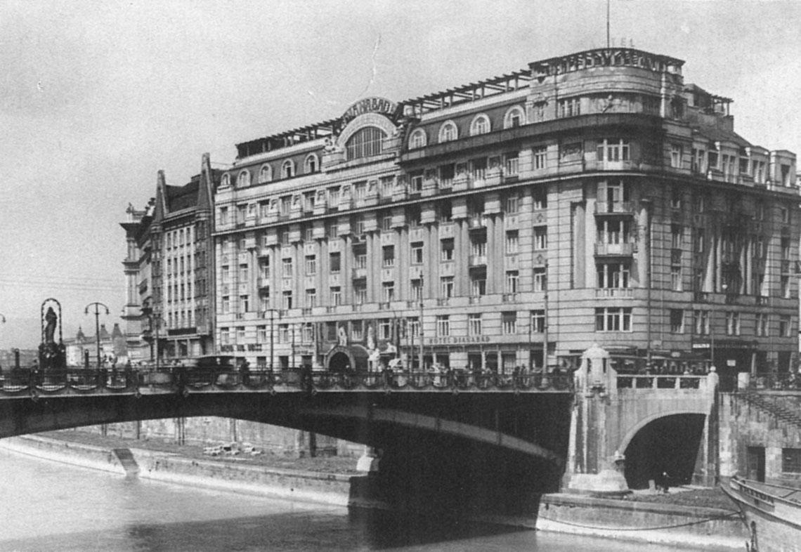 de: Der als "Hotel Dianabad" betriebene Straßentrakt des 1913 bis 1917 errichteten (zweiten) Dianabades, wie er bis zur Zerstörung 1945 zu sehen war. Die Ruine des Straßentraktes wurde 1963 abgerissen, das dahinter liegende eigentliche Bad 1965 / 1966. Foto um 1917.